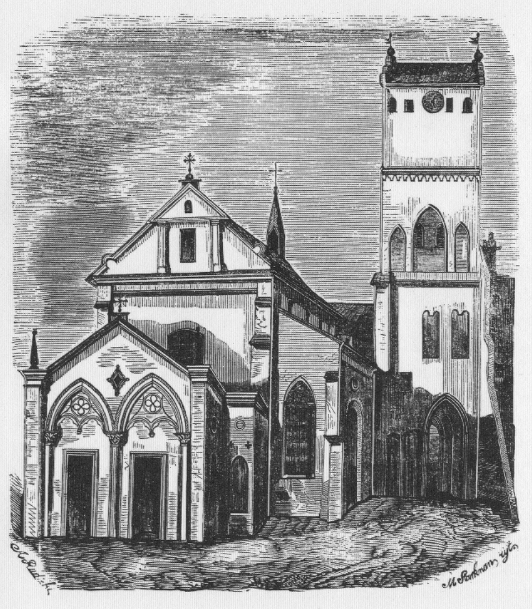 Kościół Nawiedzenia Najświętszej Maryi Panny w Warszawie na Nowym Mieście